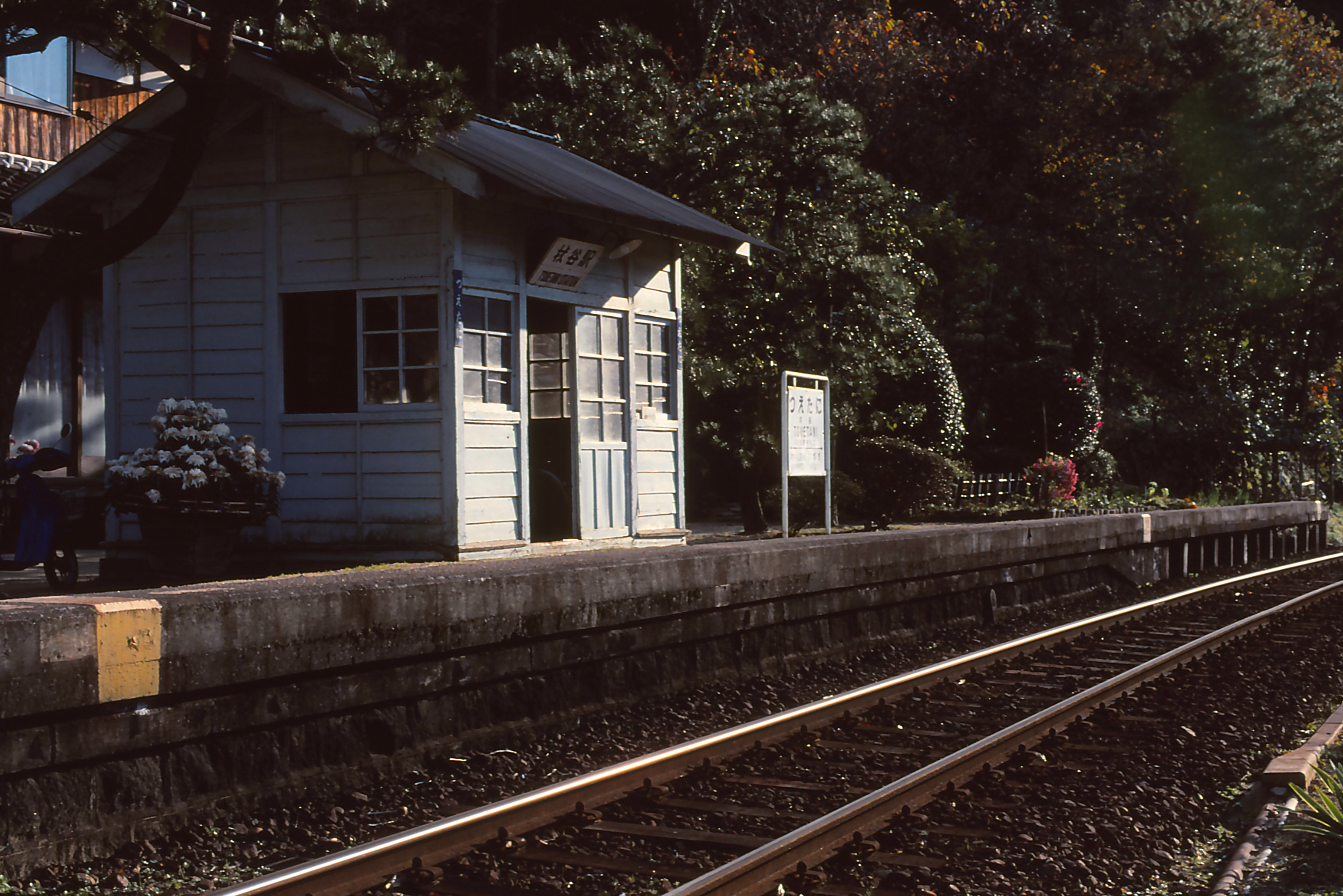 同和鉱業片上鉄道 杖谷駅